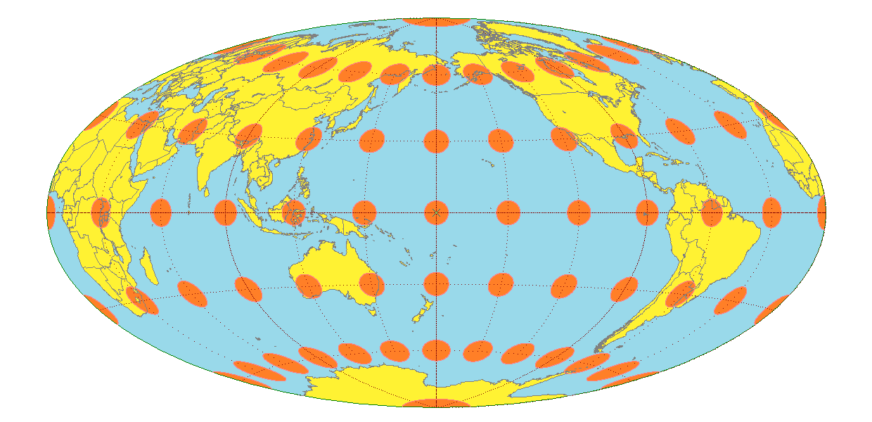 ハンメル図法の場合のテイソーの指示楕円